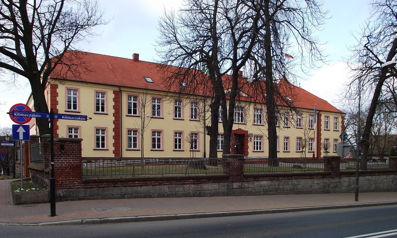 Wałcz, kolegium jezuitów (gimnazjum), 1798-1805, 1908-1909